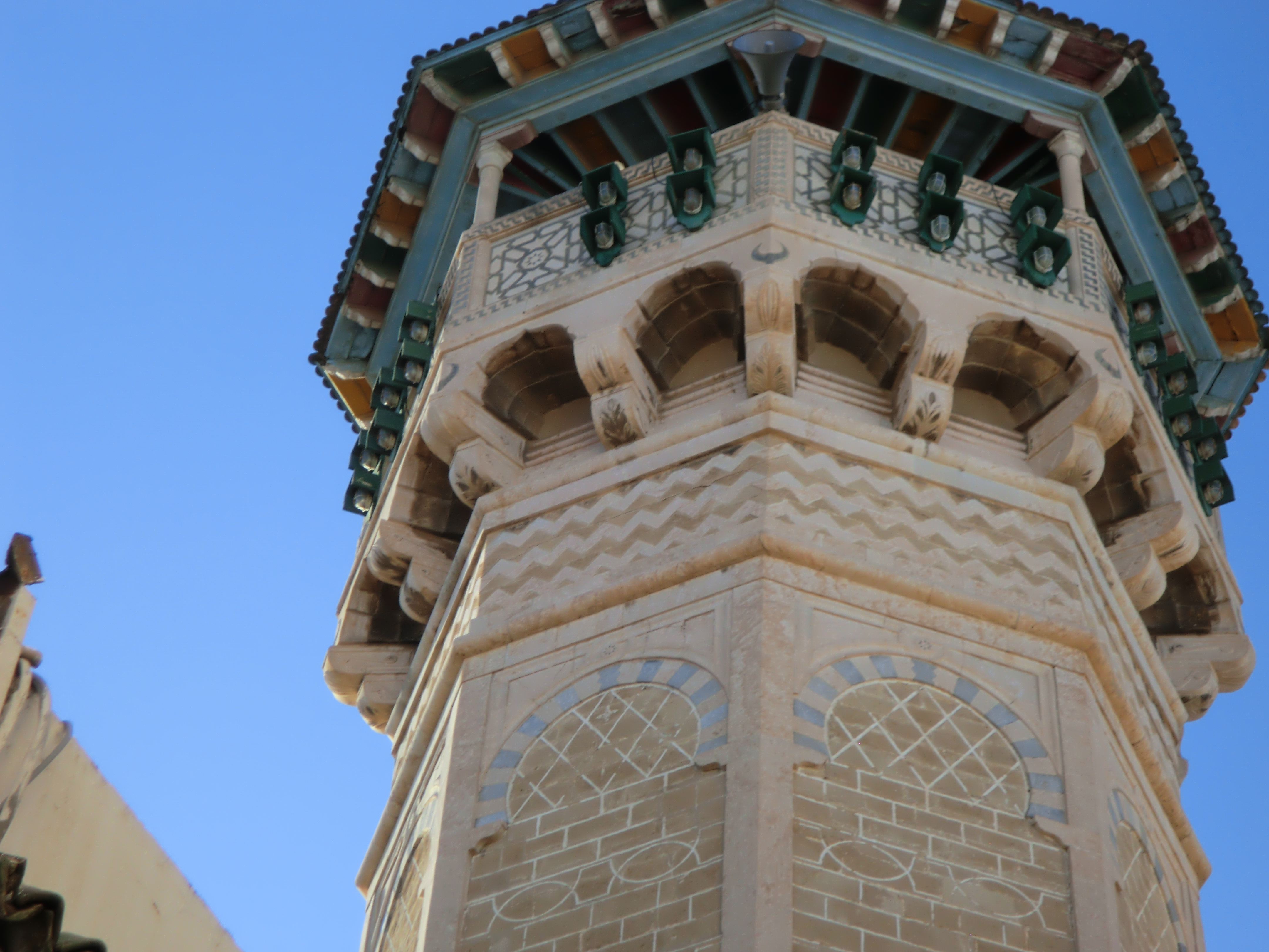 Mosquée Djamâa-Djedid, Tunis